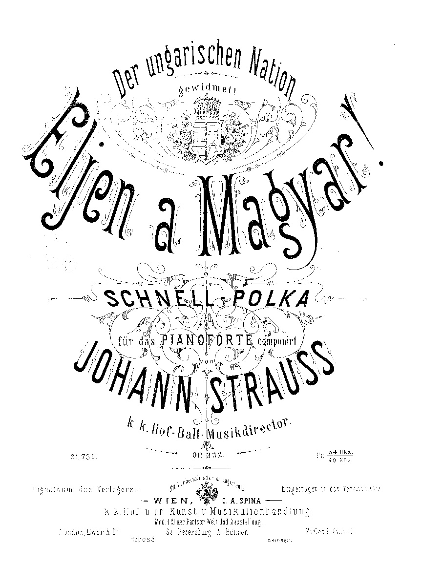 ポルカ『ハンガリー万歳!』